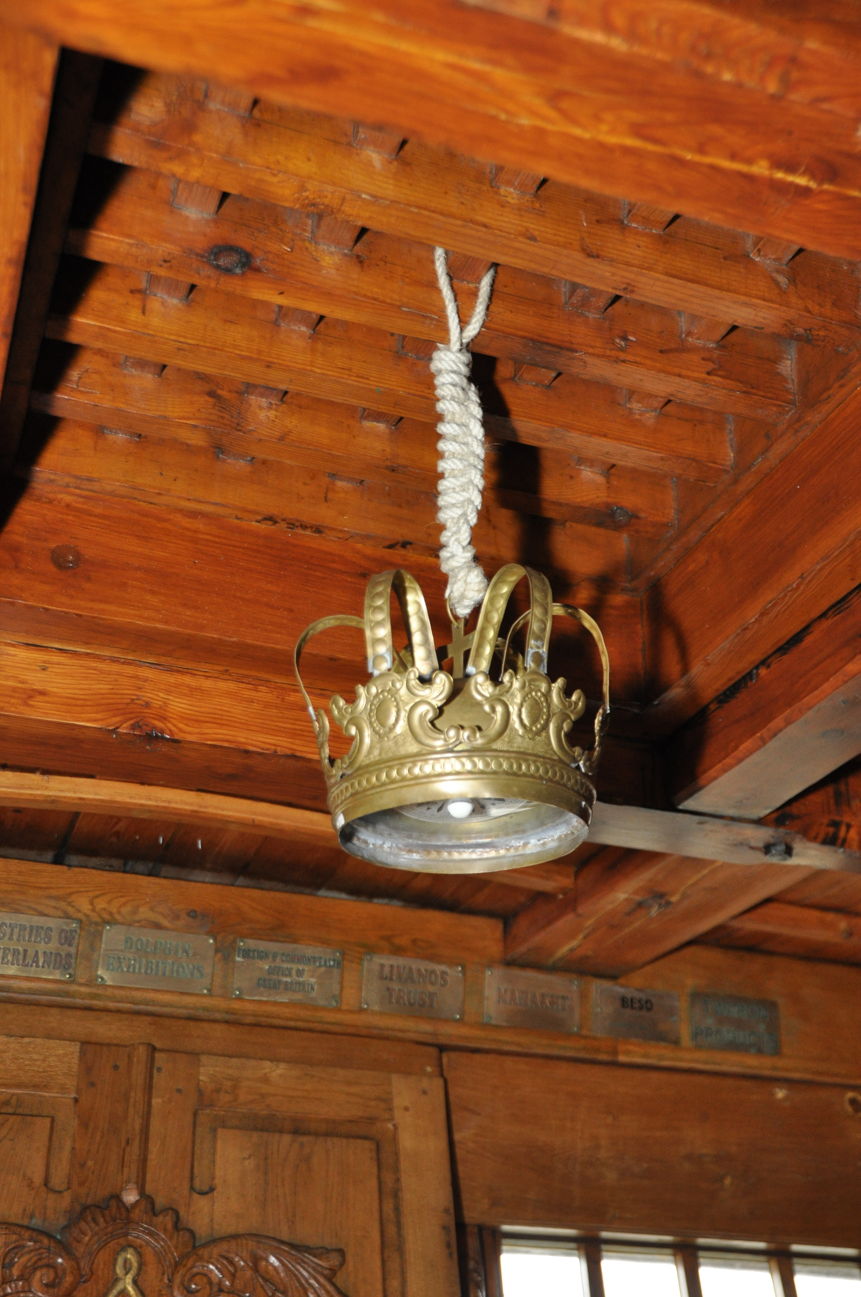 Interieur van de kapiteinshut van de SHTANDART, op de Klassieke Schepenbeurs 2010 in Enkhuizen.